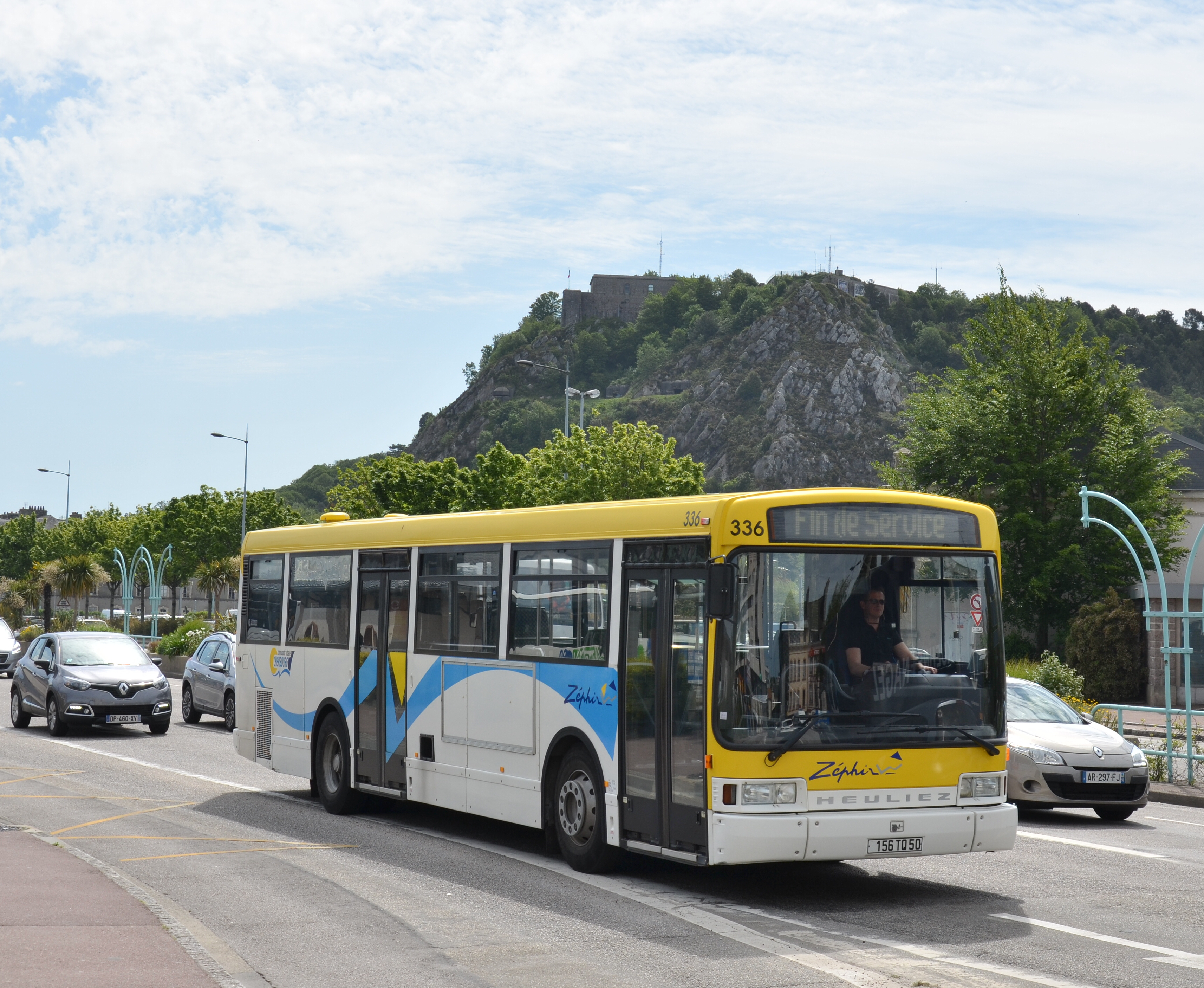 Heuliez GX 107 n°336 sortant du dépôt Zéphir Bus, près de la gare SNCF de Cherbourg.